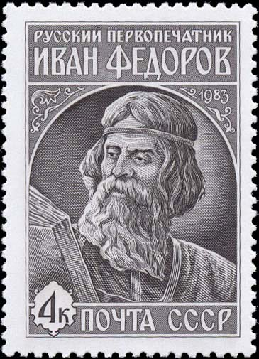 Почтовая марка СССР - Иван Фёдоров, русский первопечатник